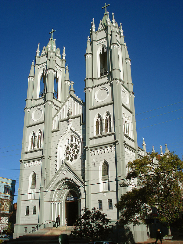 Igreja de São Pedro, Porto Alegre, Brasil.